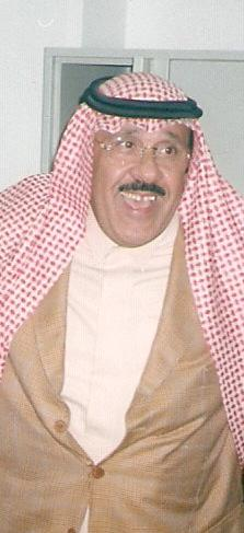 Abdulrahman bin Saud